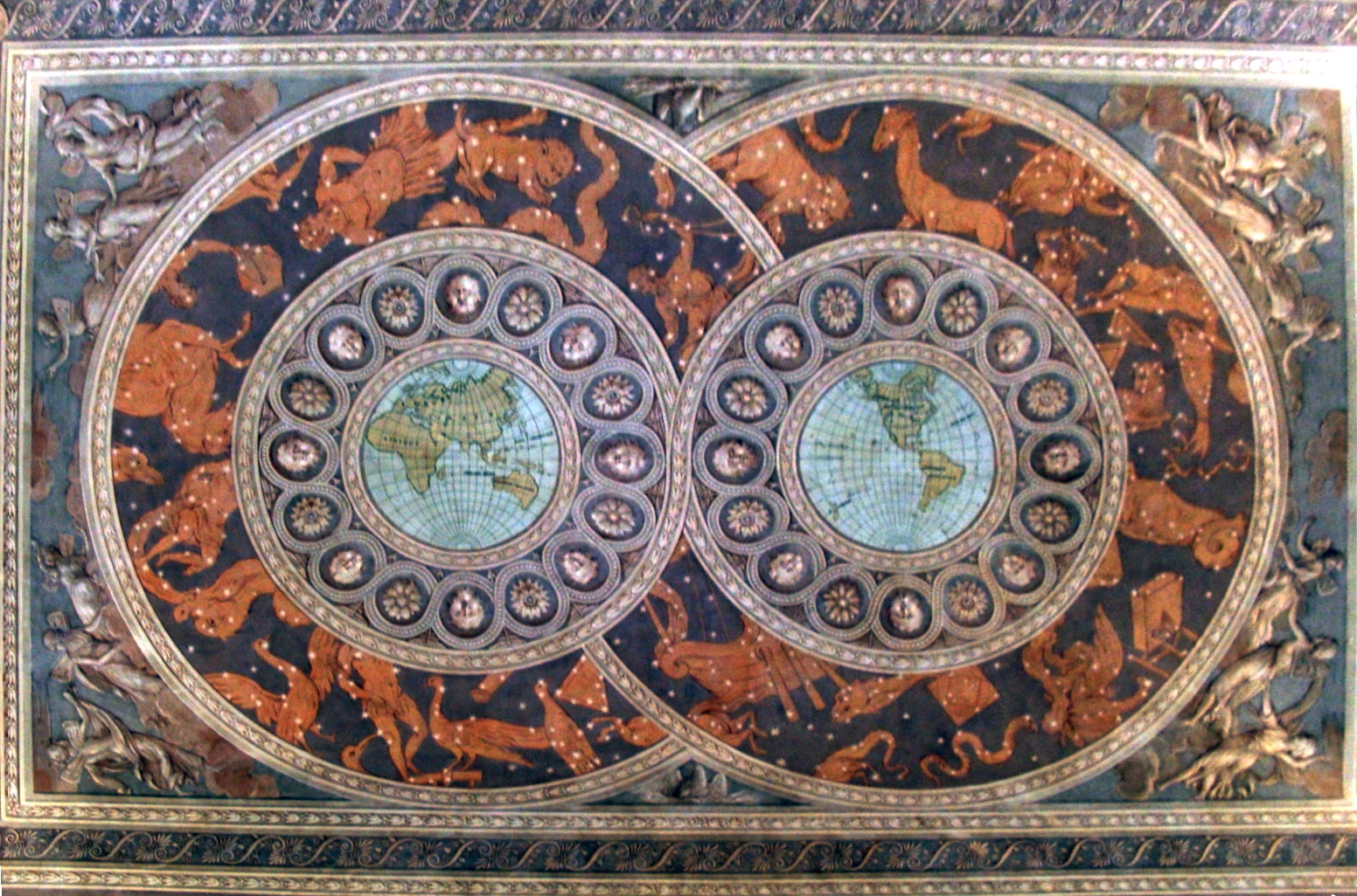 Immagine dalla Reggia di Caserta, Caserta, Campania, Italia. Affresco nella prima sala della Biblioteca. Soggetto: Gli emisferi con i segni zodiacali e le costellazioni; Epoca: seconda metà del XVIII secolo; Autori: Carlo Vanvitelli e Filippo Pascale.